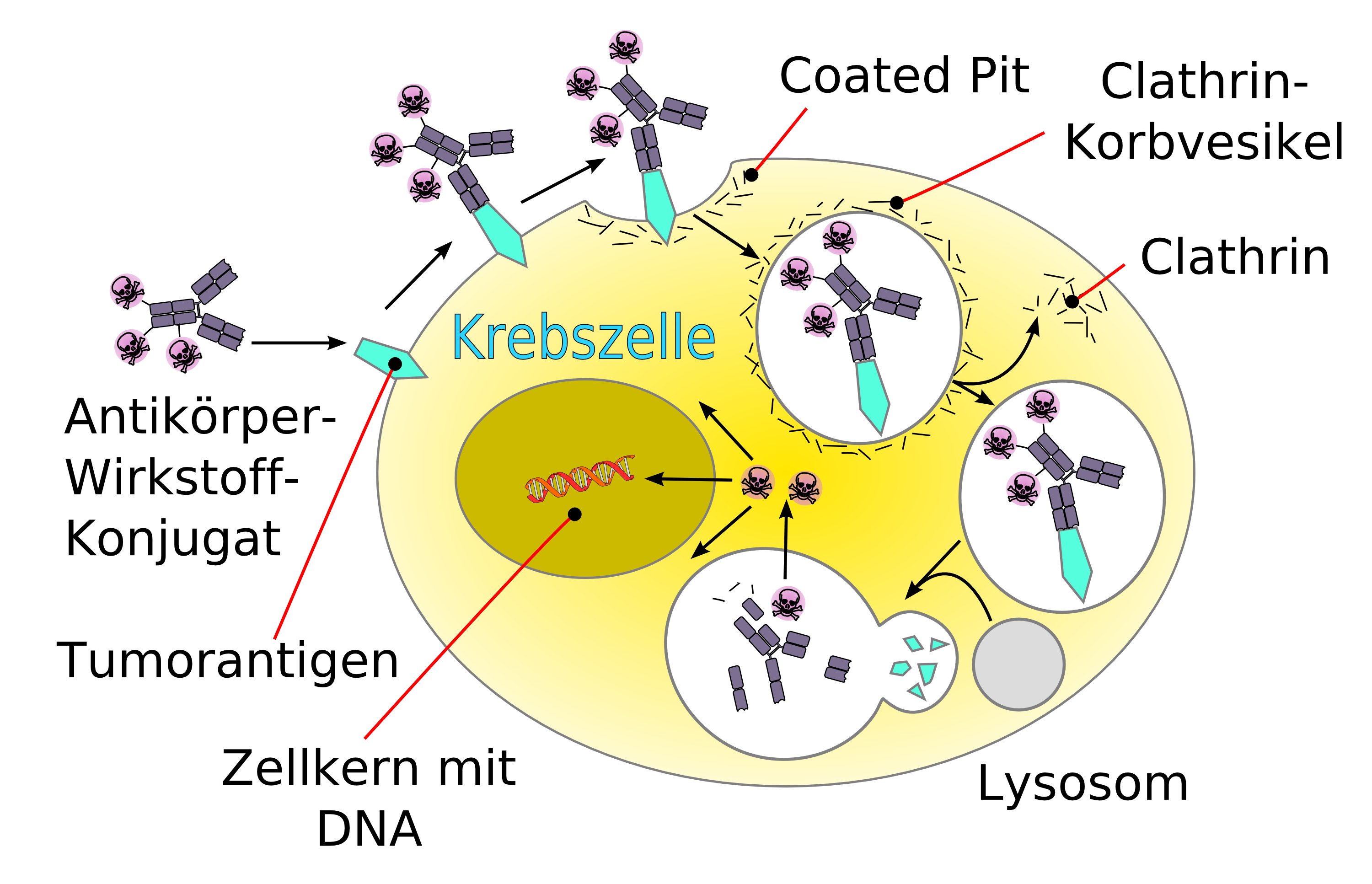 Schematische Darstellung der Endozytose eines Antikörper-Wirkstoff-Konjugates (Armed Antibody). Darstellung nach D. Schrama u. a.: Antibody targeted drugs as cancer therapeutics. In: Nat Rev Drug Discov 5, 2006, S. 147-159. PMID 16424916